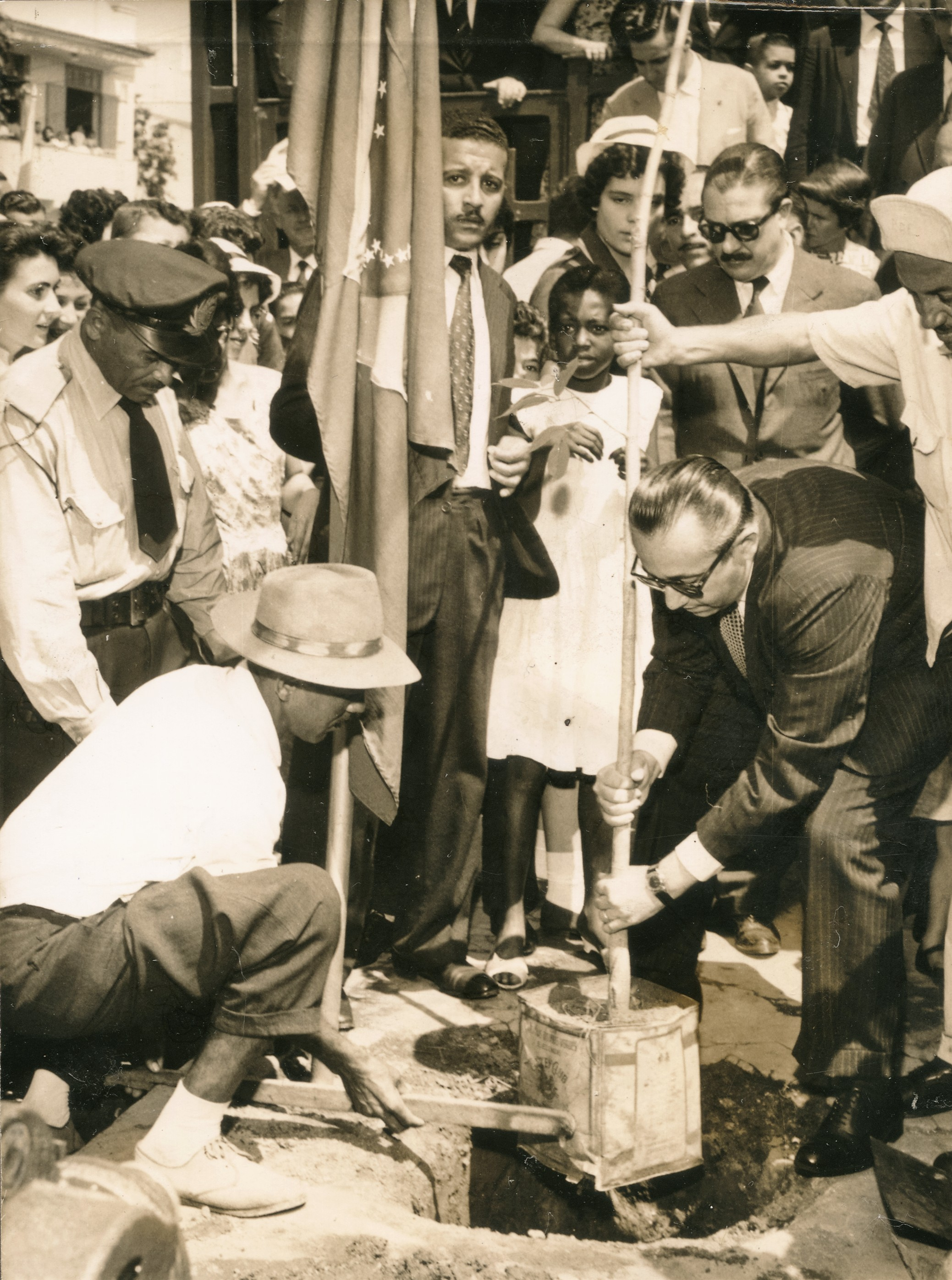 Fotografia do Fundo Correio da Manhã, sob a guarda do Arquivo Nacional.